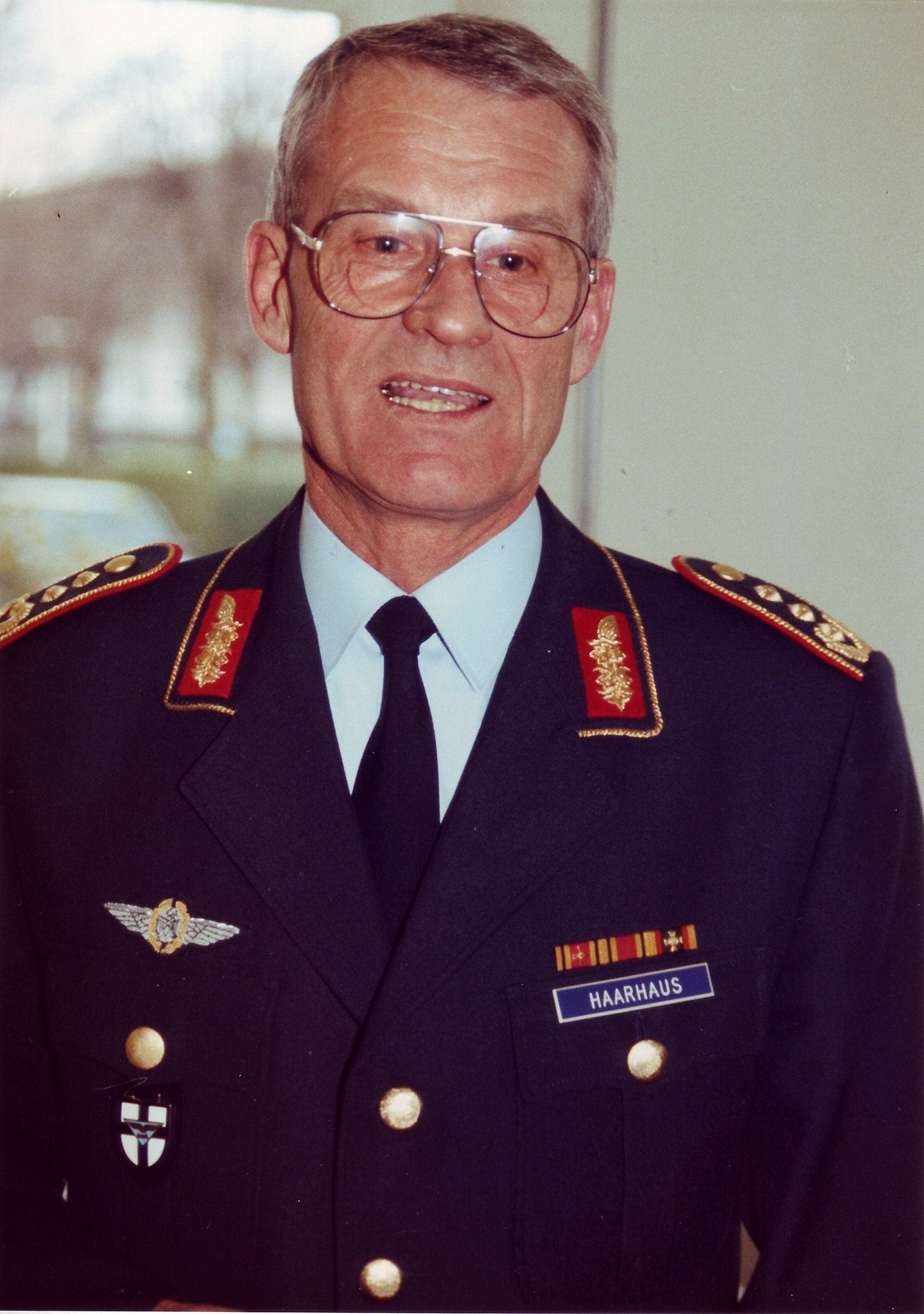 meine letzte Verwendung